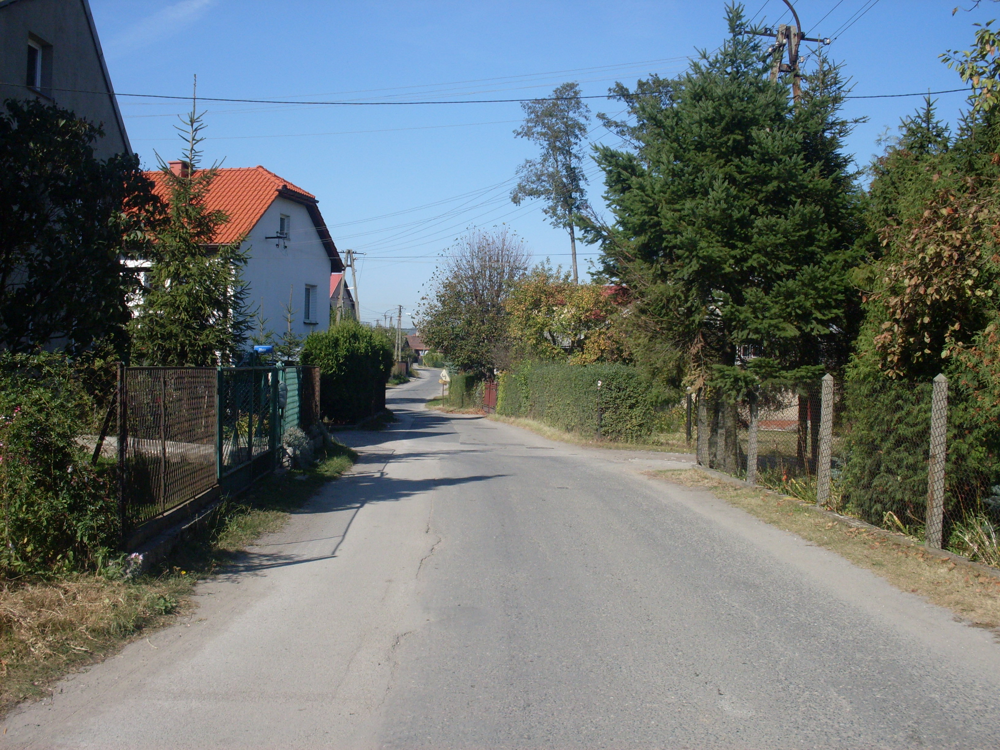 Tenczynek.Część wsi - Zielona""